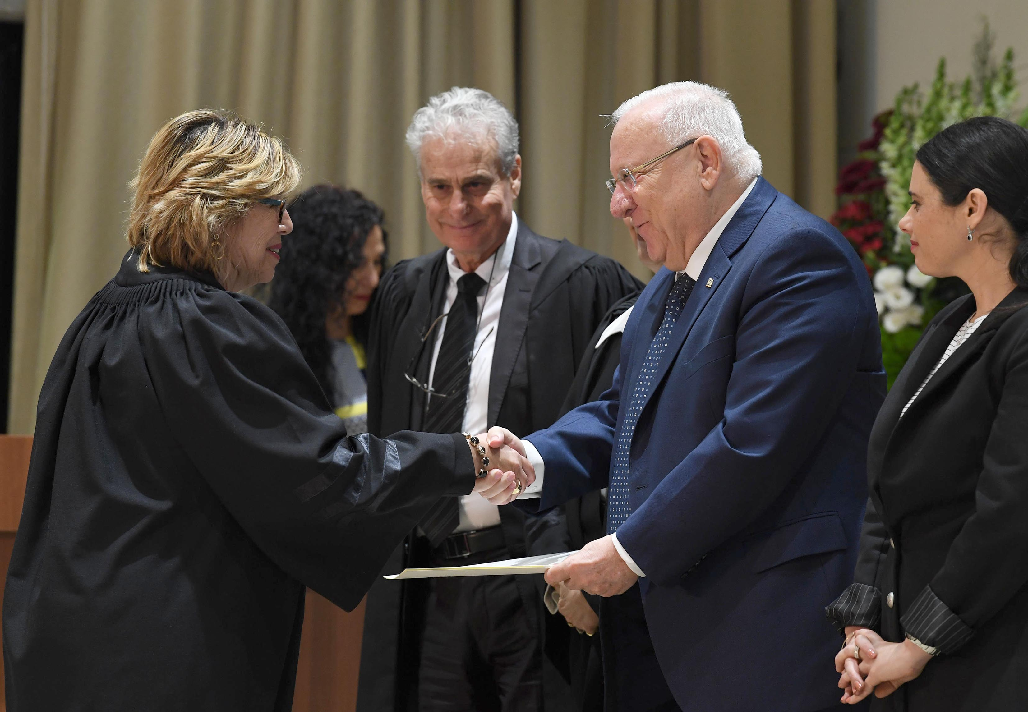 טקס השבעת שופטים בבית הנשיא בנוכחות שופטי בית המשפט העליון והשרה איילת שקד ראובן ריבלין לוחץ את ידה של נשיאת בית הדין הארצי לעבודה הנכנסת השופטת ורדה וירט לבנה